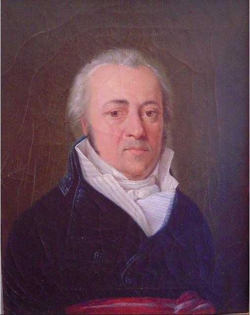 Portrait de Julien-François Douillard, réalisé probablement par Jean-François Sablet